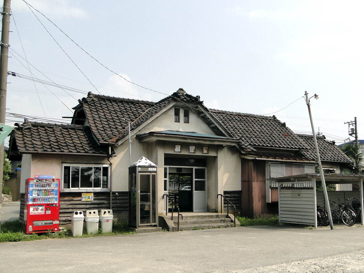 経田駅 平成22年